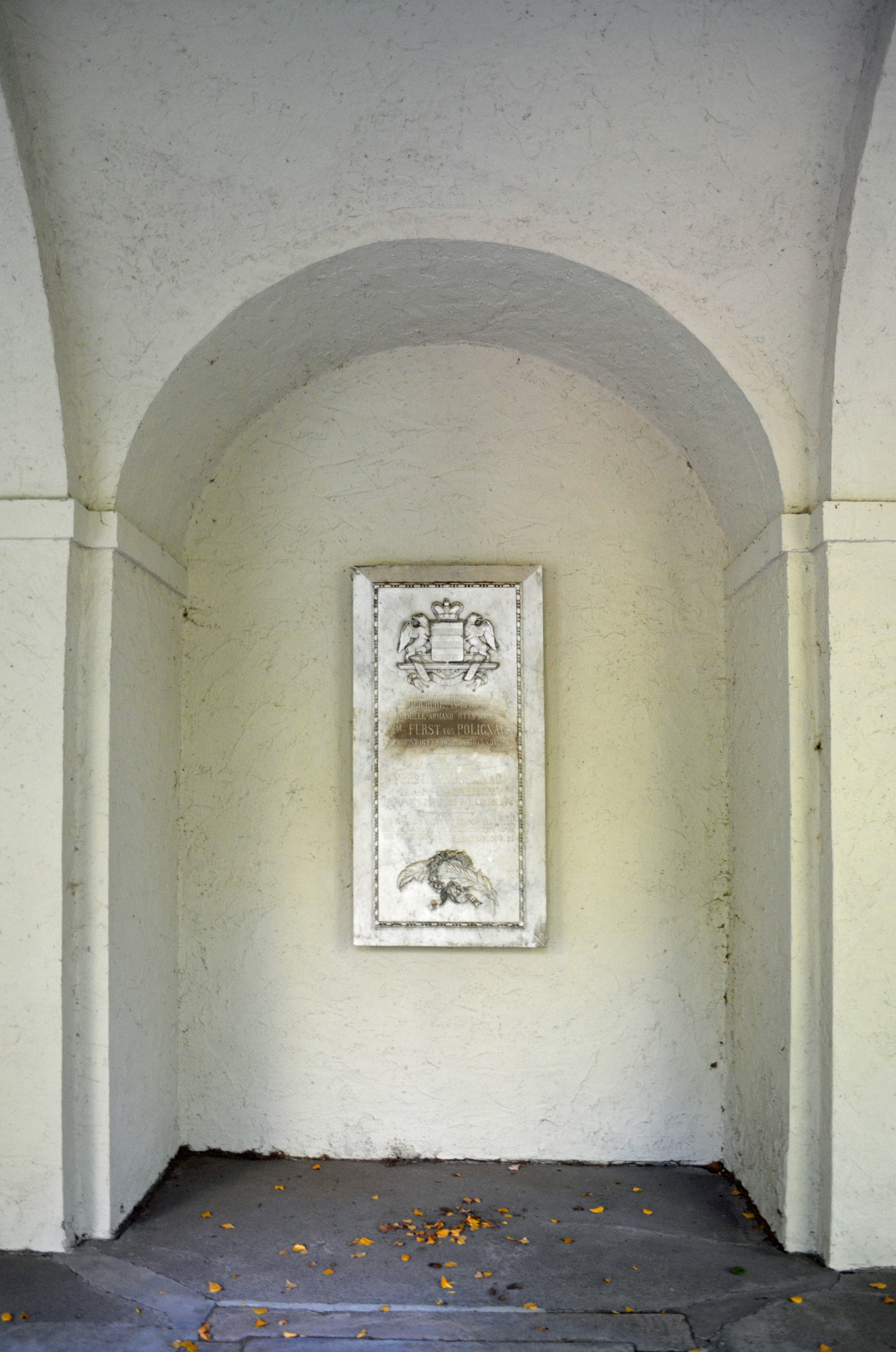 Frankfurt, Hauptfriedhof, Gruftenhalle, Gruft 30, Camille Armand Jules Marie de Polignac